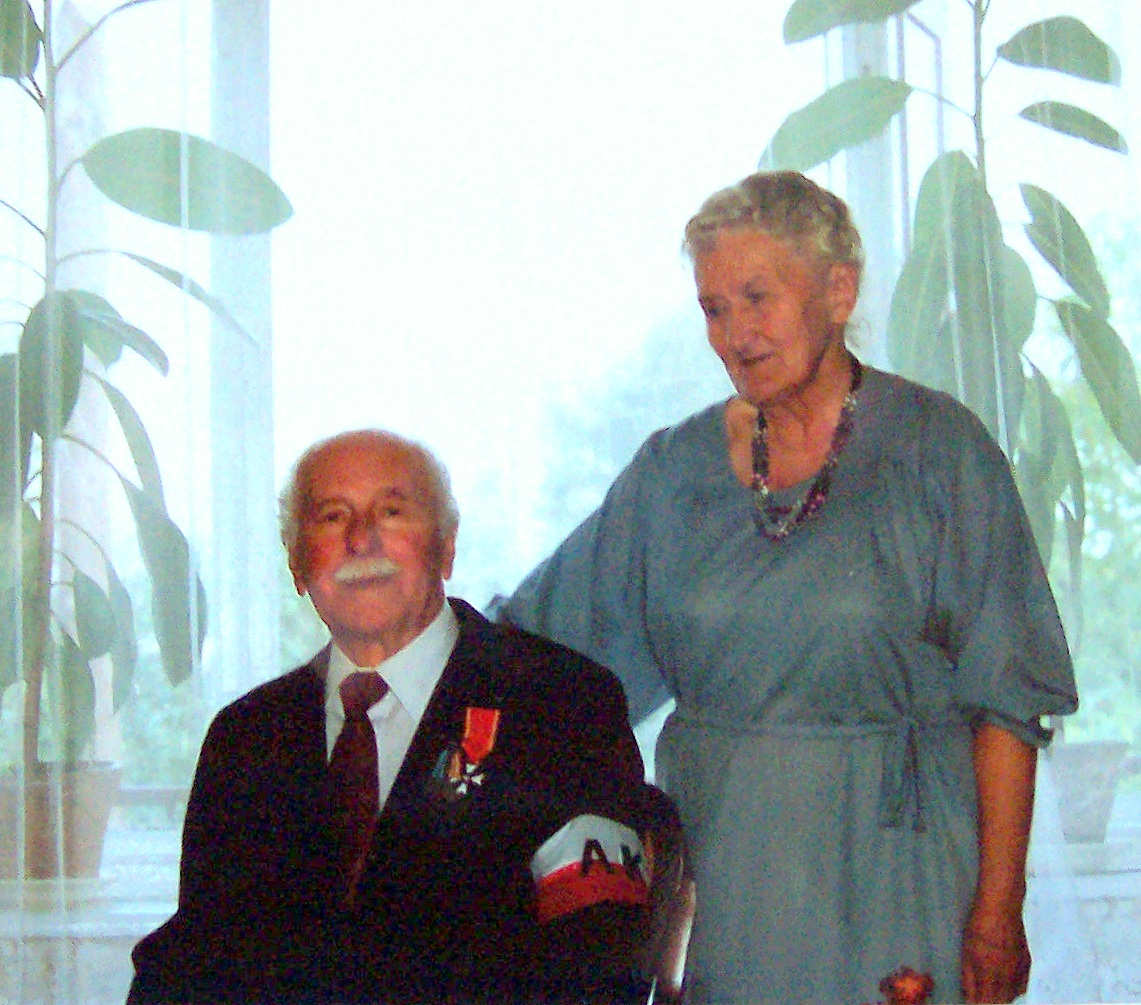 Dekoracja płk. Zygmunta Żyłki-Żebrackiego Krzyżem Kawalerskim Orderu Odrodzenia Polski (Sanok, 1994). Pułkownik wraz z żoną Marią, z domu Hrycaj..